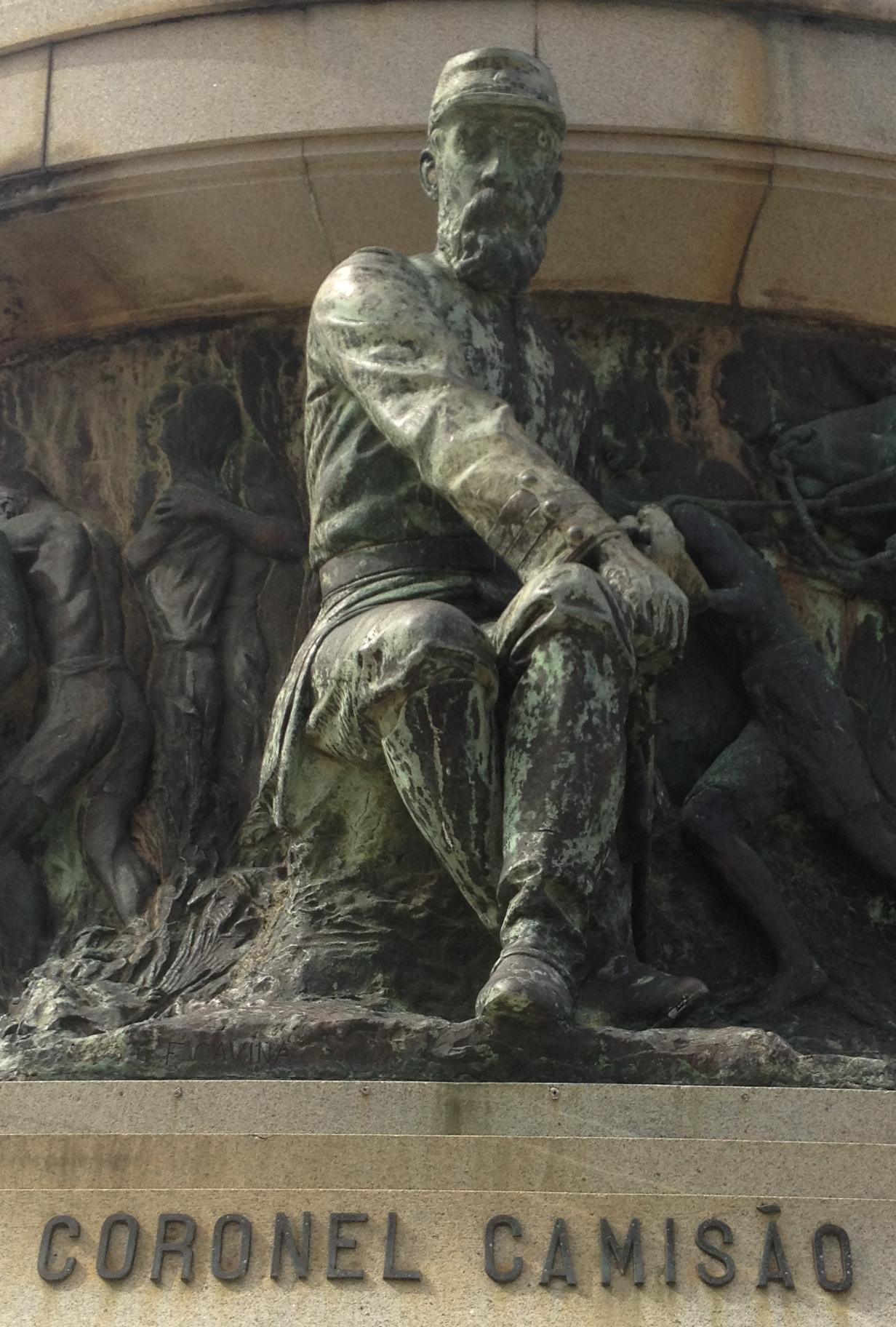 Estátua do Coronel Carlos de Morais Camisão no Monumento aos Heróis de Laguna e Dourados, localizado no bairro da Urca, no Rio de Janeiro (RJ).